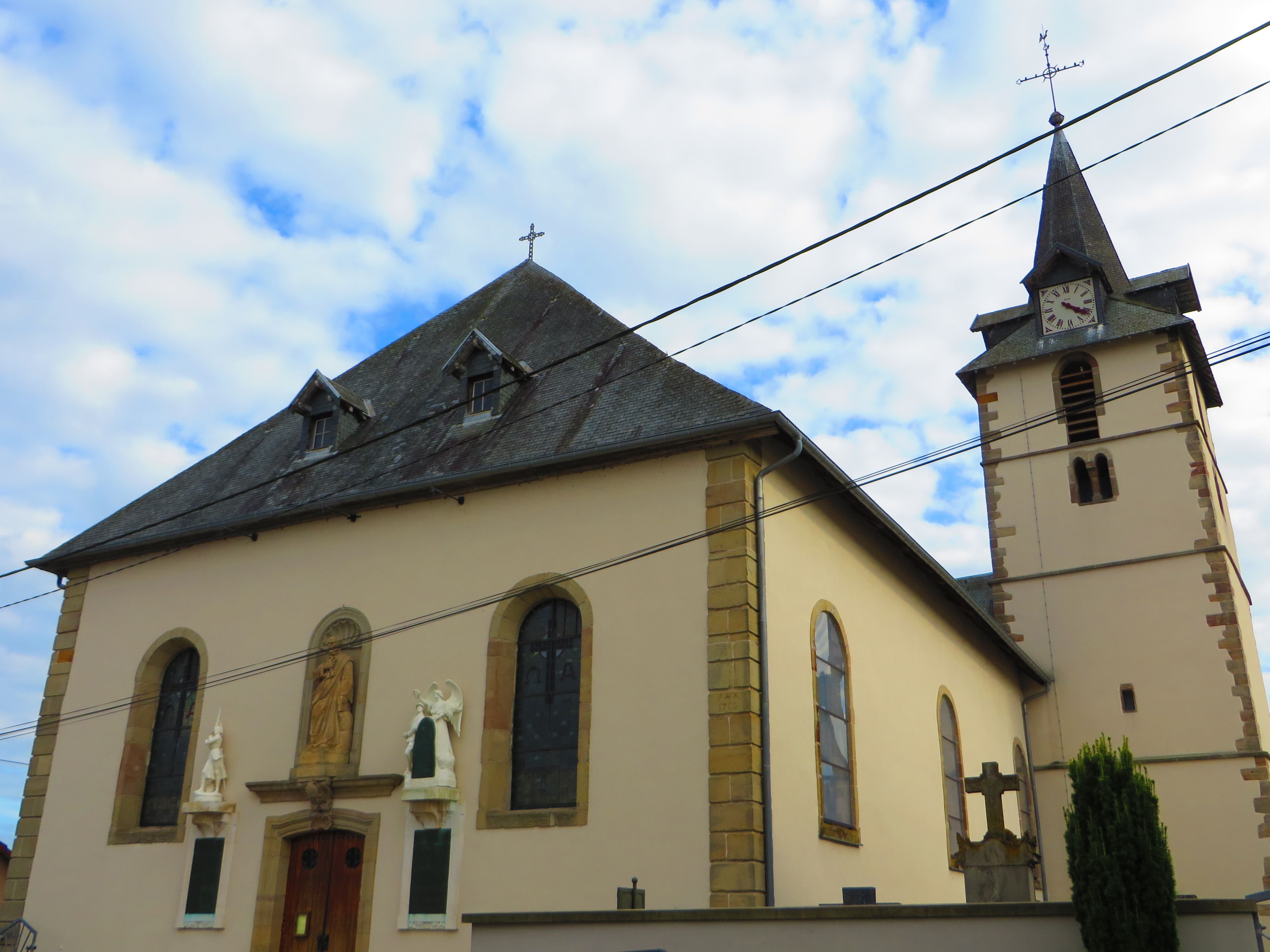 Val de Guéblange l'église Saint-Pierre à Guéblange lès Sarralbe